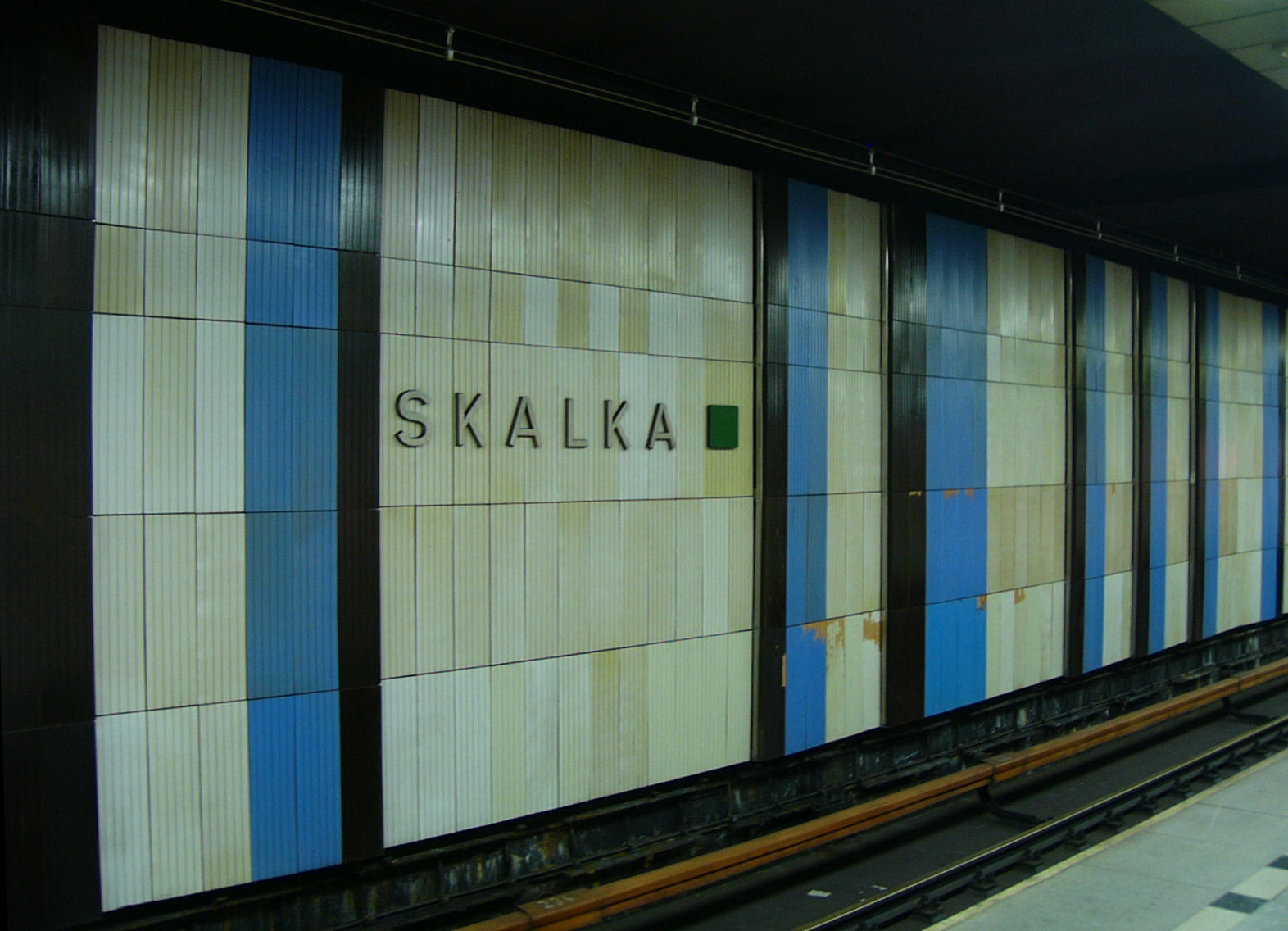 Metro station Skalka in Prague - Stanice pražského Skalka